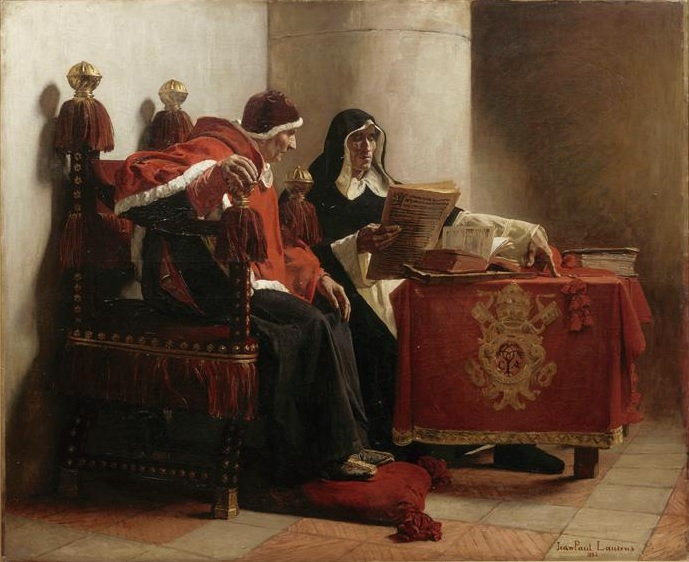 Représentation du pape Sixte IV près de Torquemada